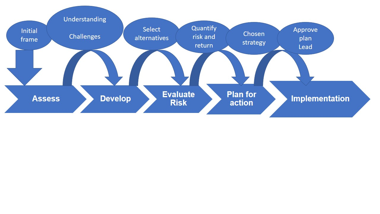 Process value-creating strategy